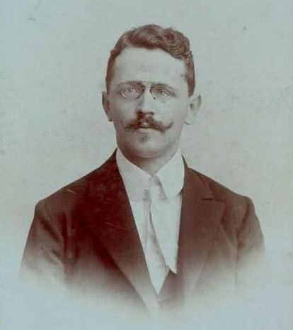 Albin Prepeluh (1881-1937), Slovene politician.